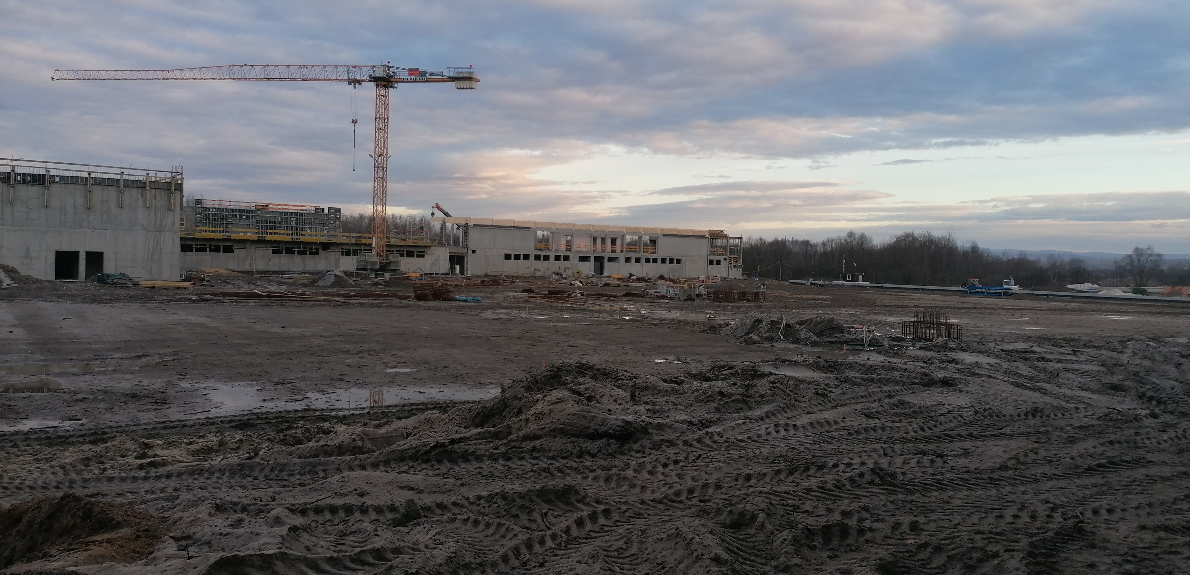 Budowa "Piłkarskiego Centrum Treningowo-Badawczego Polski Południowej dla Szkoły Mistrzostwa Sportowego oraz Cracovii" w Rącznej